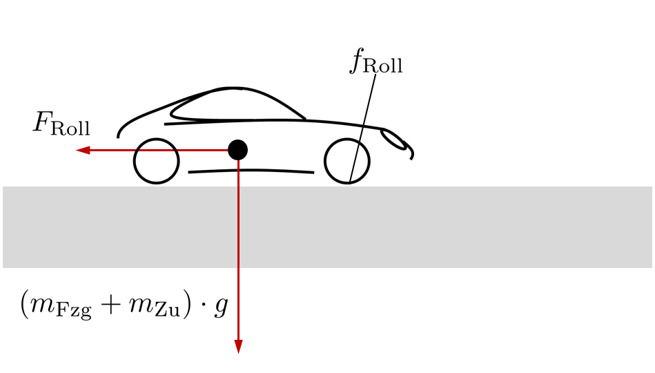 Prinzipskizze zum Rollwiderstand an Fahrzeugen